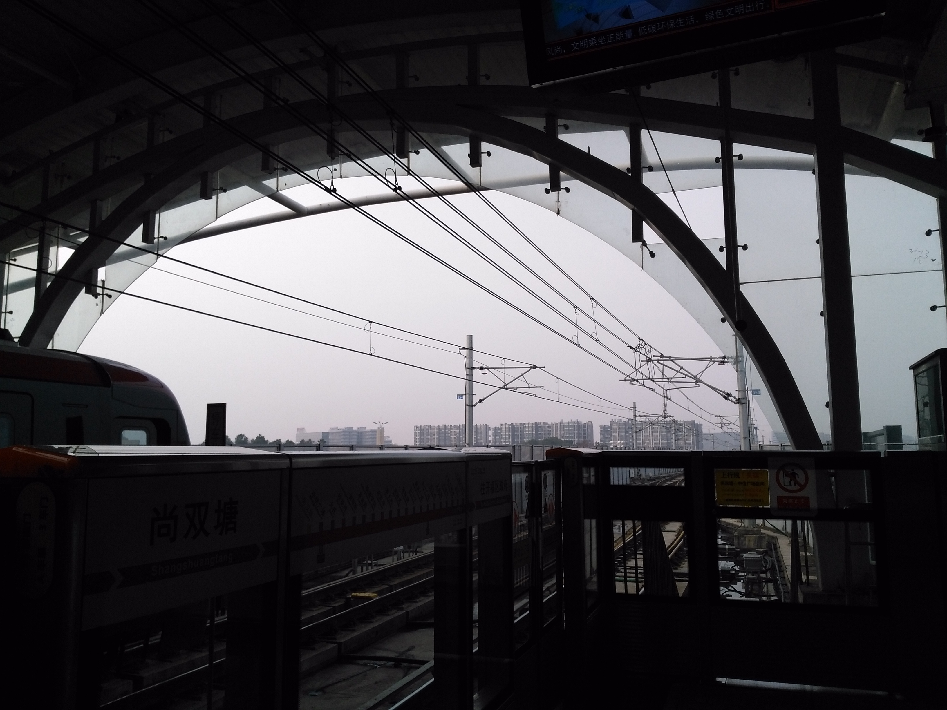 图为长沙地铁一号线尚双塘高架车站内景